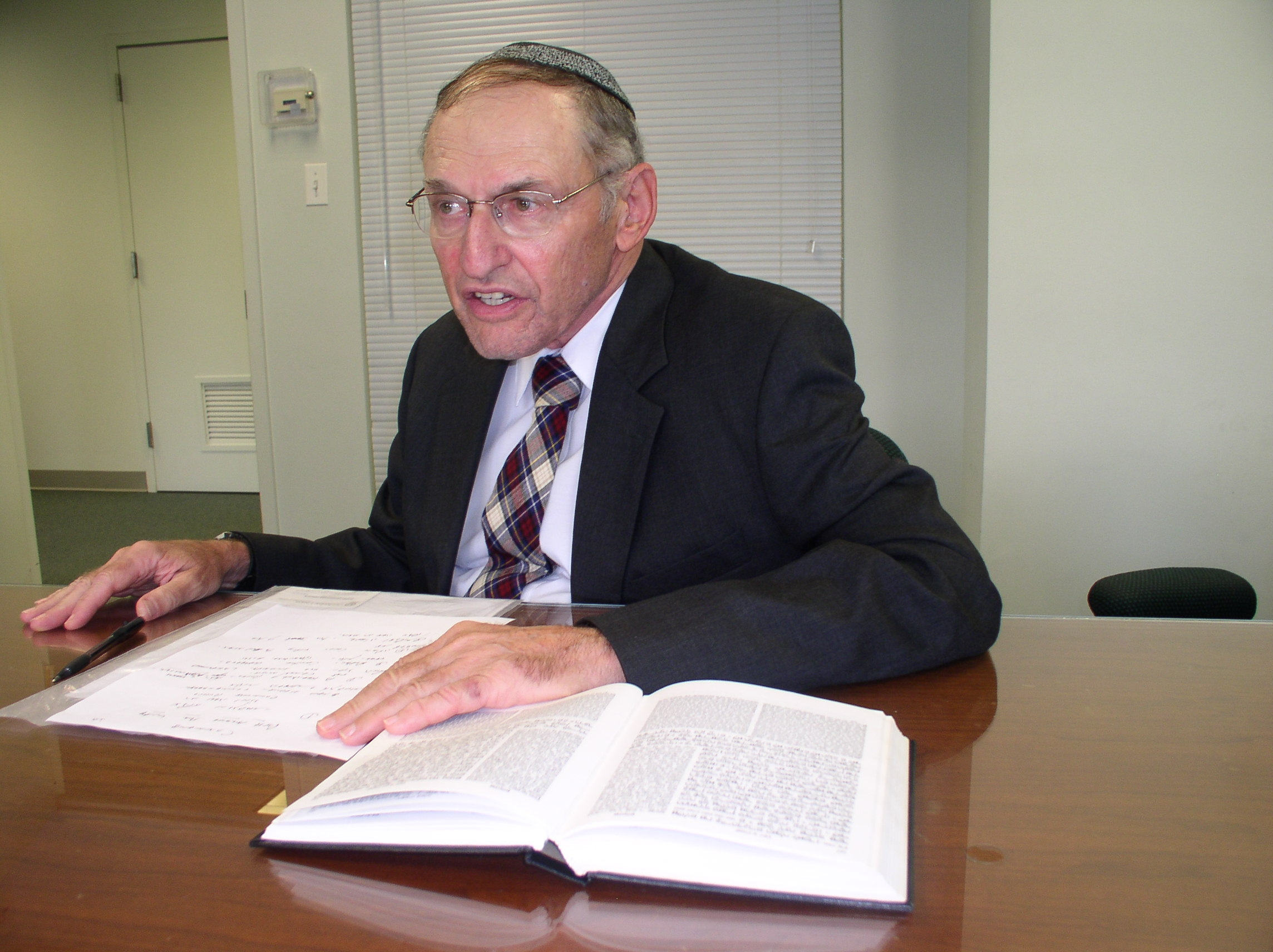 Rabbi Rakeffet teaching in Gruss Kollel in Jerusalem